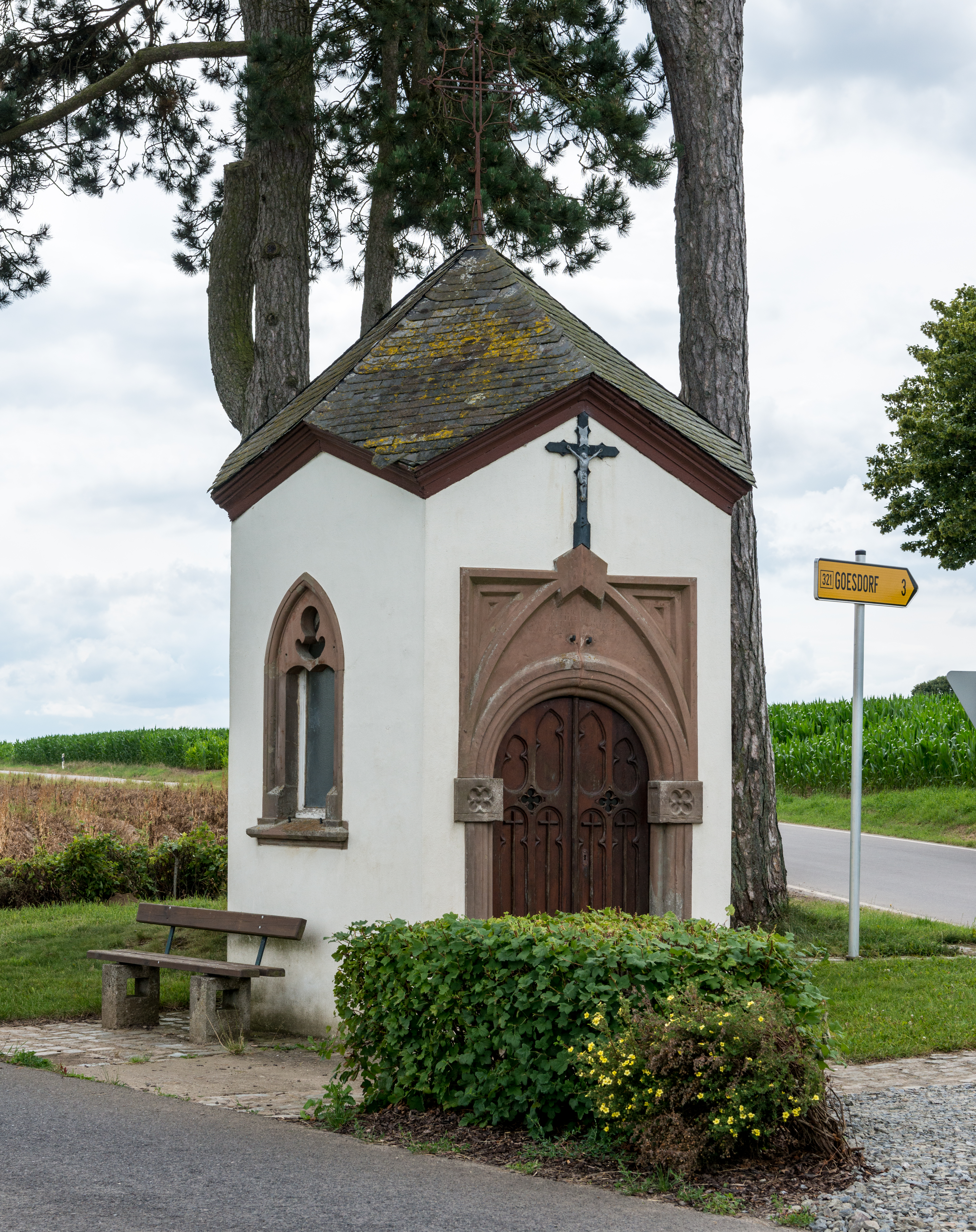 D'Weekapell südlech vun Nacher um CR331.